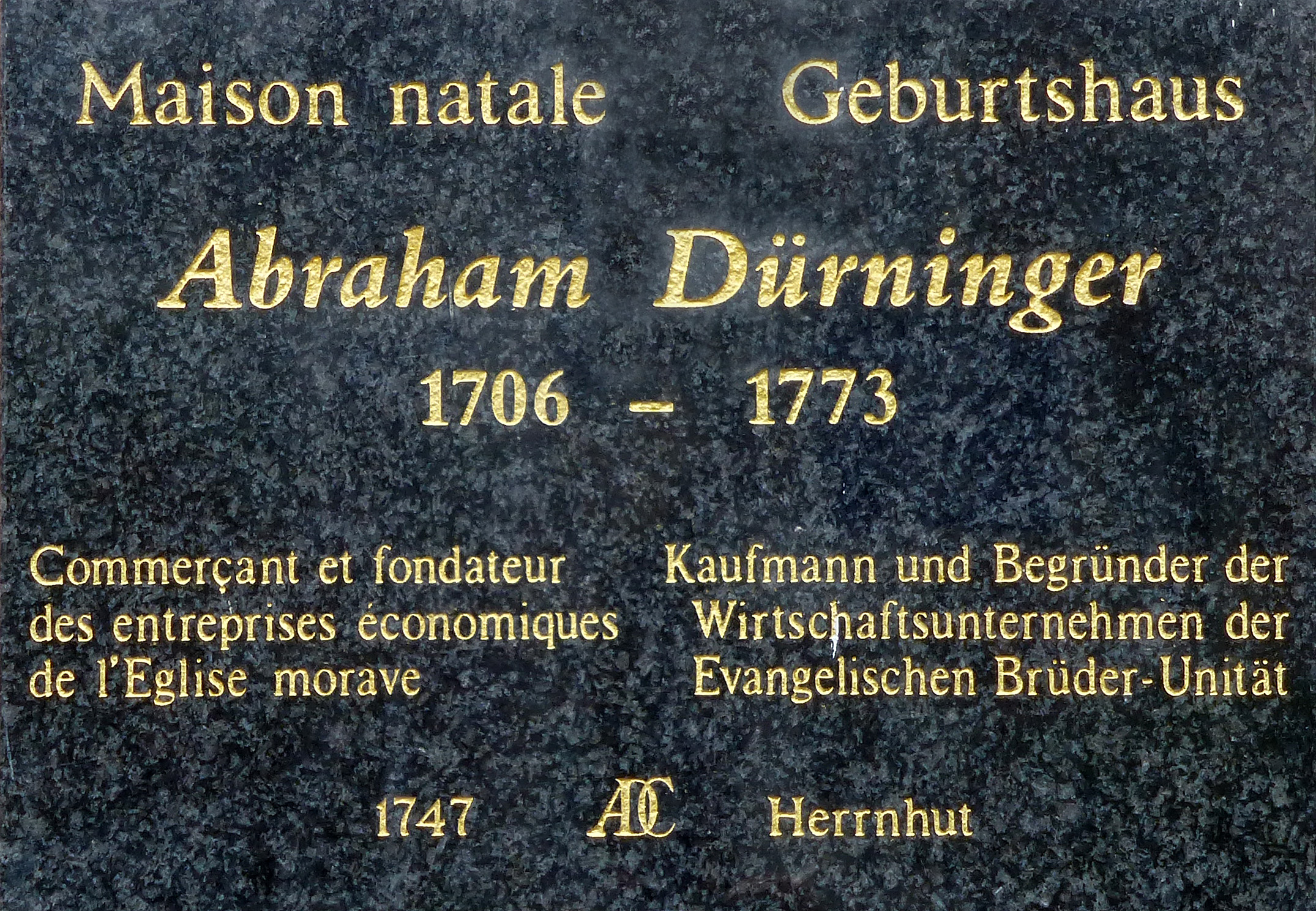 Strasbourg : plaque sur la maison natale d'Abraham Dürninger (1706-1773), 34, quai des Bateliers